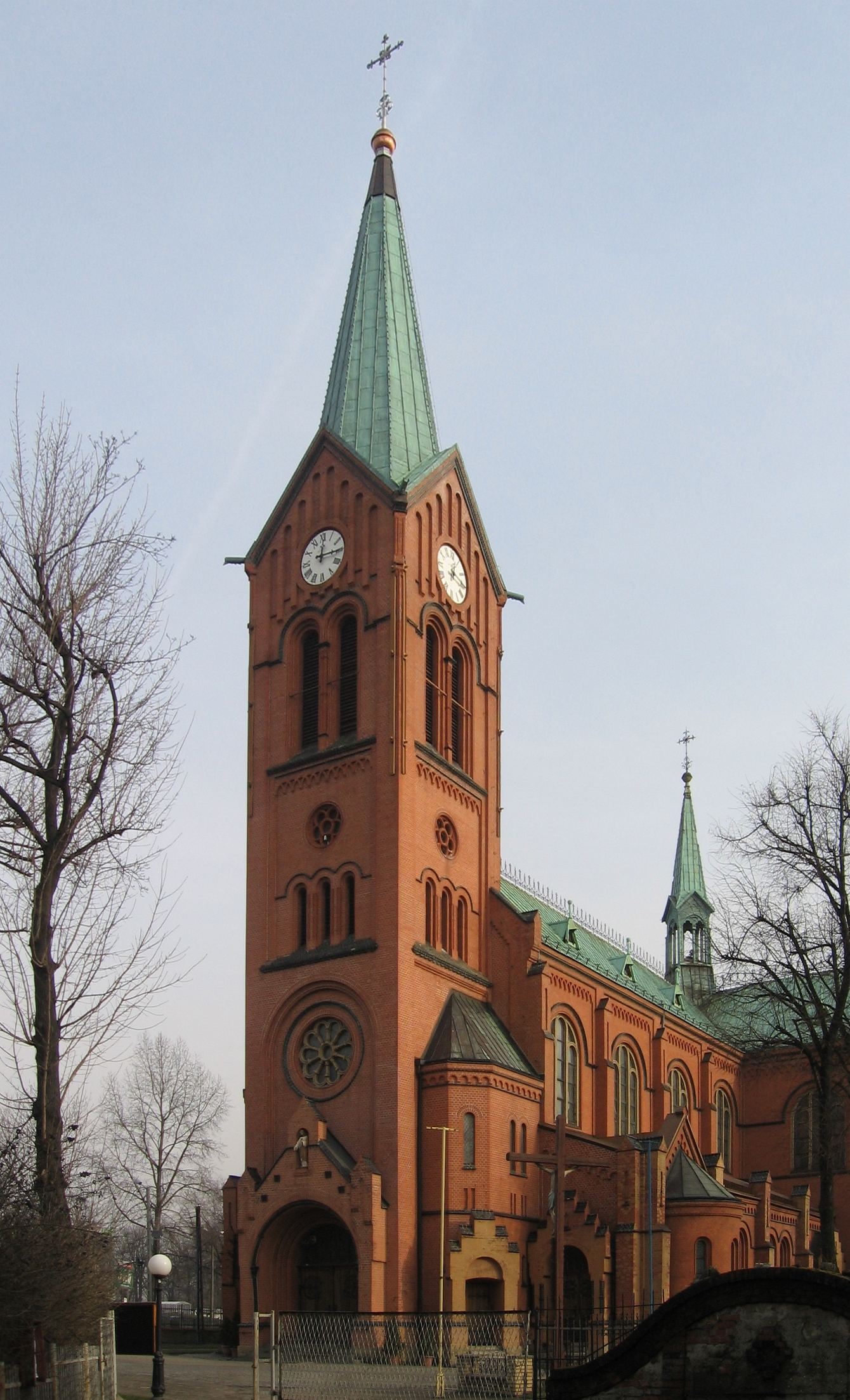 Bytom-Szombierki, kościół Najświętszego Serca Pana Jezusa.